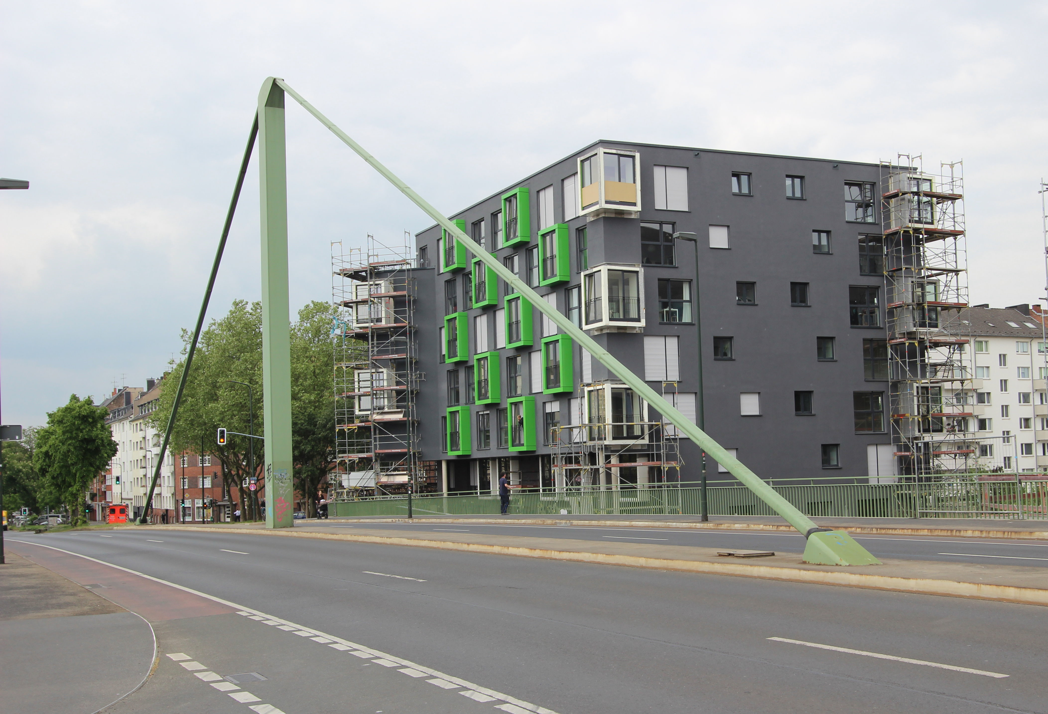 40477 Düsseldorf-Pempelfort; Übergang zwischen Jülicher Straße und Grunerstraße. Schrägseil-Brückenkonstruktion von 1963. Blick aus Osten. Aufnahme 2016.